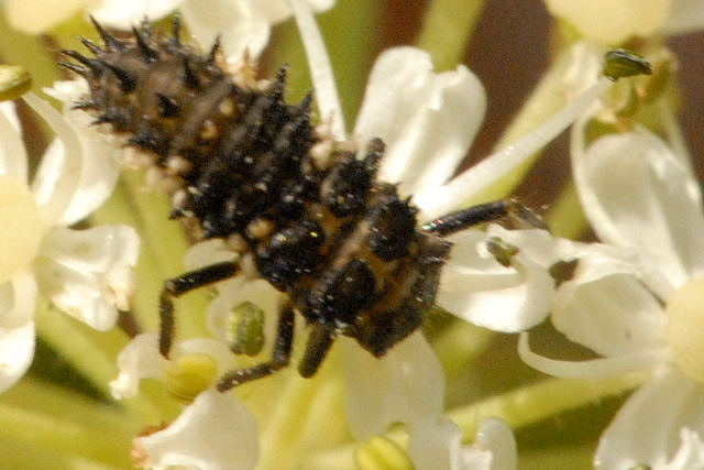 Calvia quatuordecimguttata from Commanster, Belgian High Ardennes .